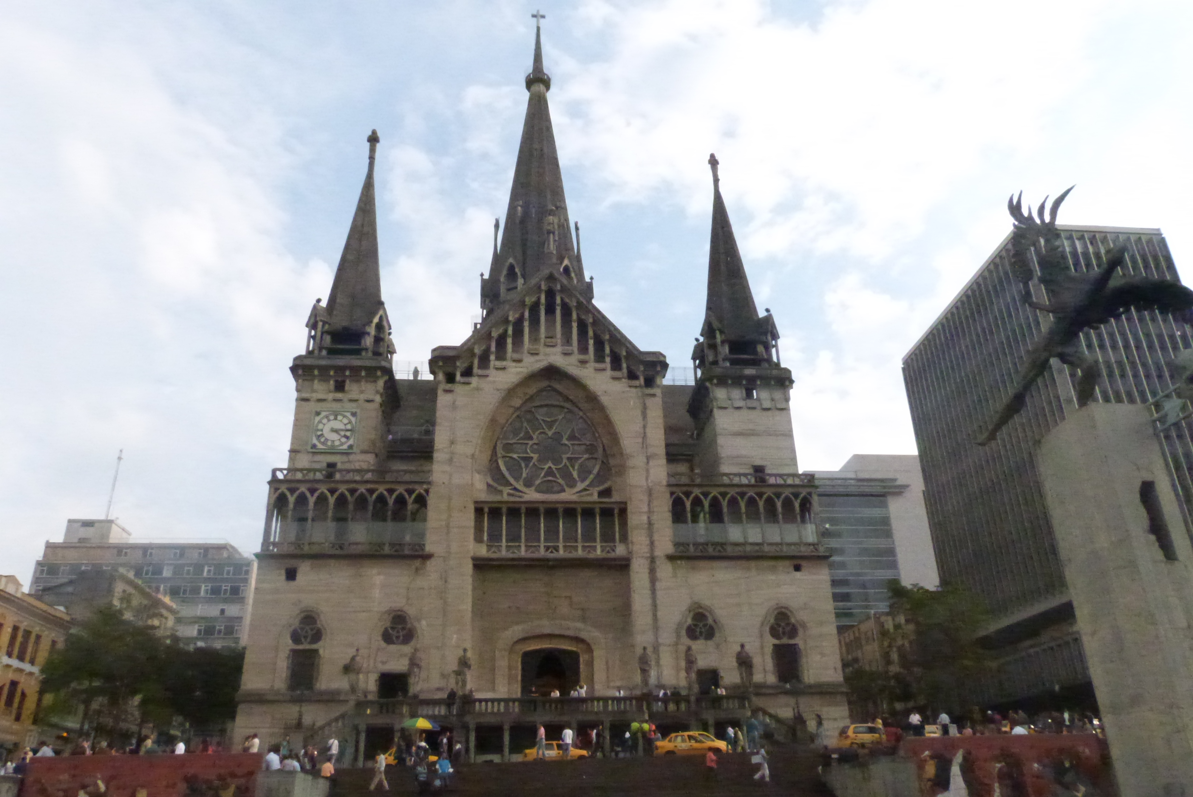 diafragma: 8 velocidad: 1/2000s iso: 1600 plano general